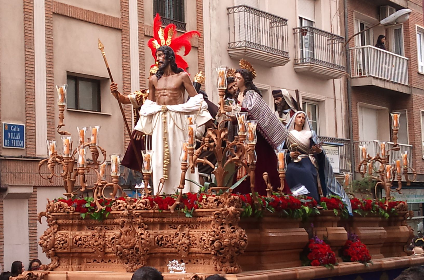 Paso de misterio de Nuestro Señor de la Pasión Despojado de sus Vestiduras por las calles de Jaén el Lunes Santo de 2011.